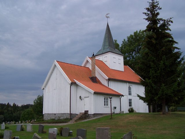 Mari kirke i Enebakk kommune, Akershus, Norway